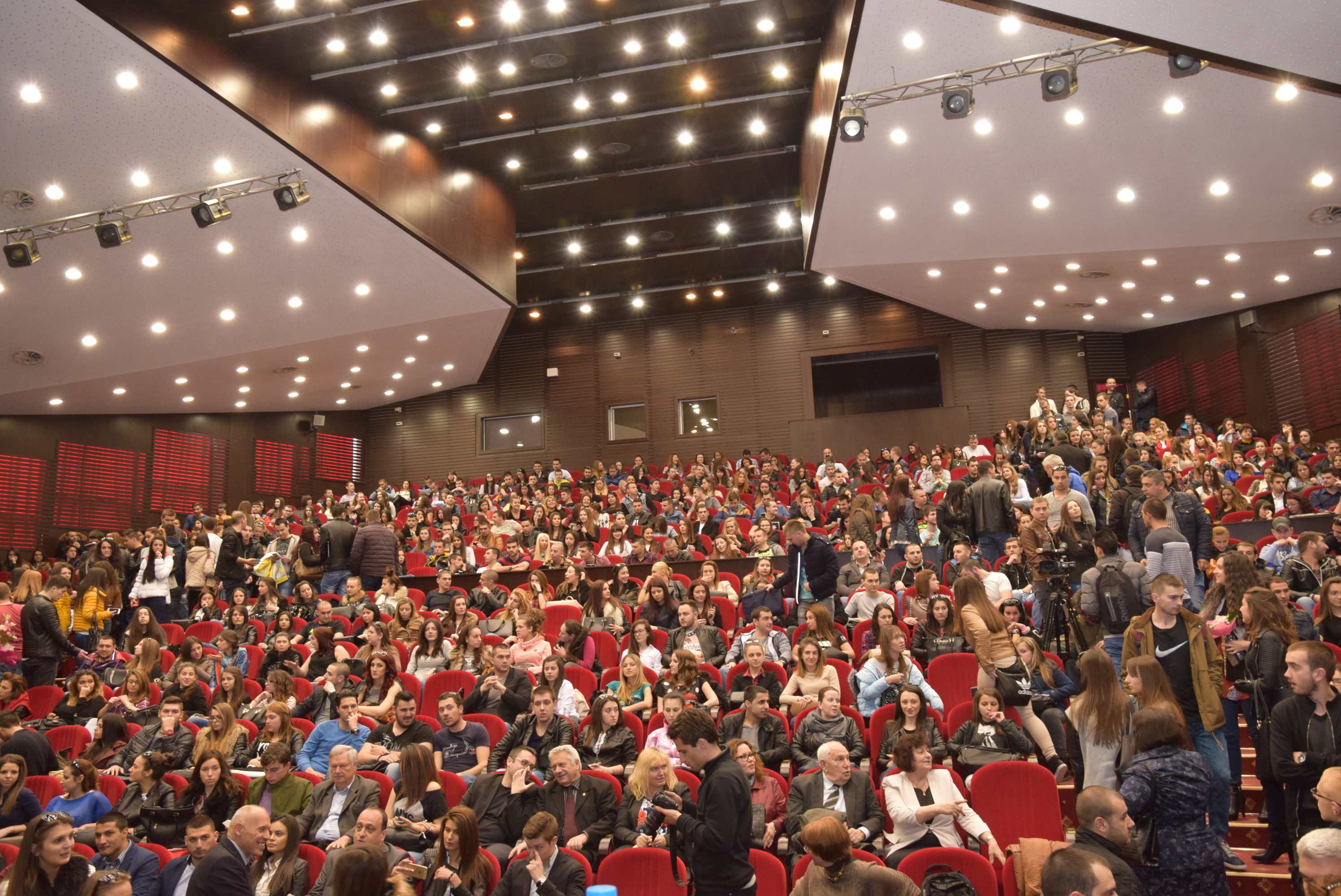 Аула Максима